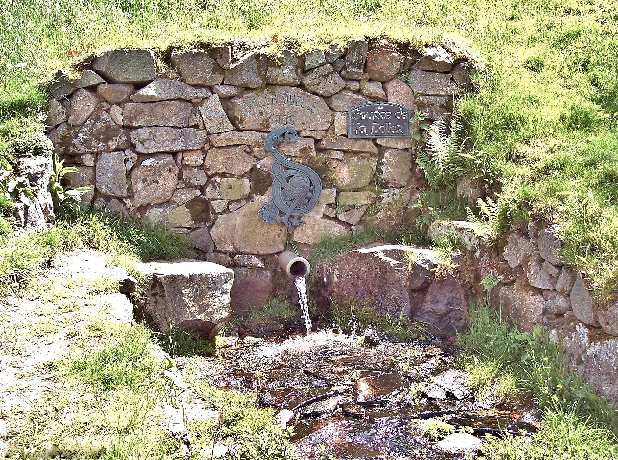 Source de la Doller, sous le col de la Fennematt. Dolleren. Haut-Rhin